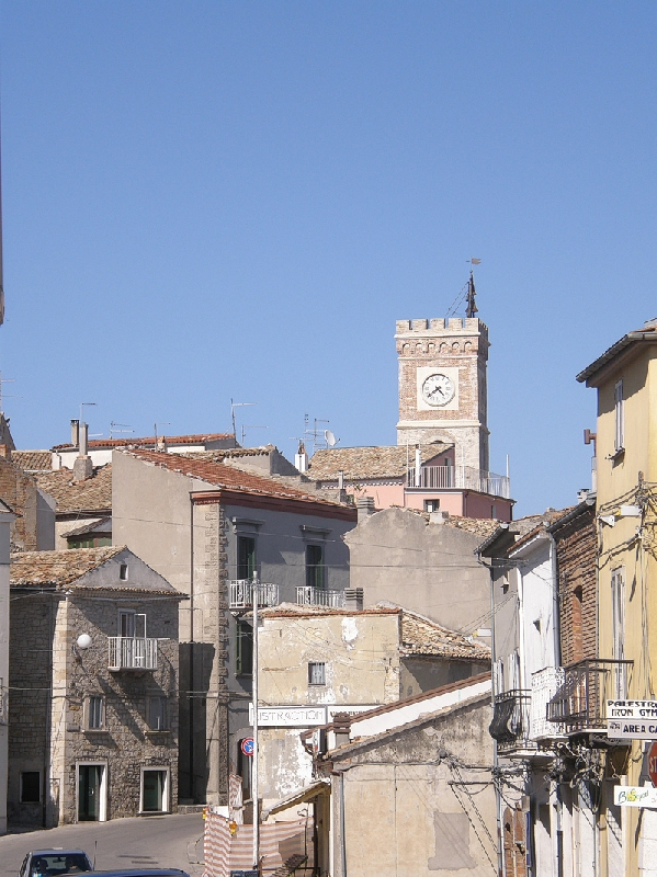 Apulia Molise Campania 2009